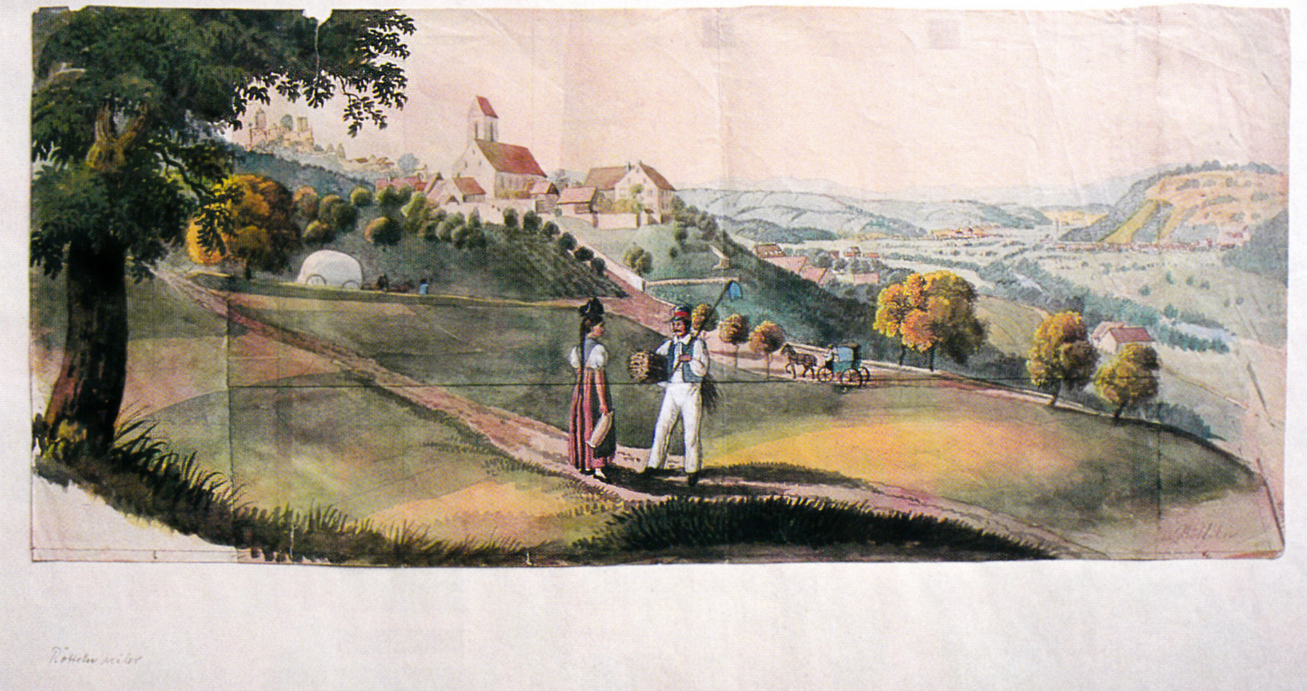 Dorf Rötteln mit ländlichem Paar im Vordergrund; Aquarell zusammengestückt, 24,4 x 55 cm; Museum Schiopfheim, Inv. Nr. GFRA 23